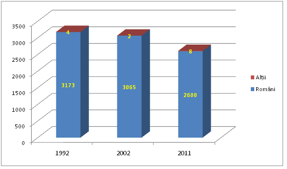 Grafic cu evoluția populației comunei Bordei Verde realizat pe baza rezultatelor ultimelor recensaminte